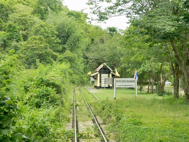 ภาพจากท้ายขบวน